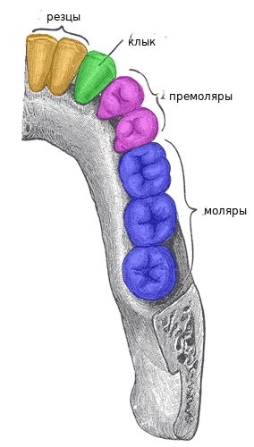 коренные зубы правая сторона нижняя челюсть